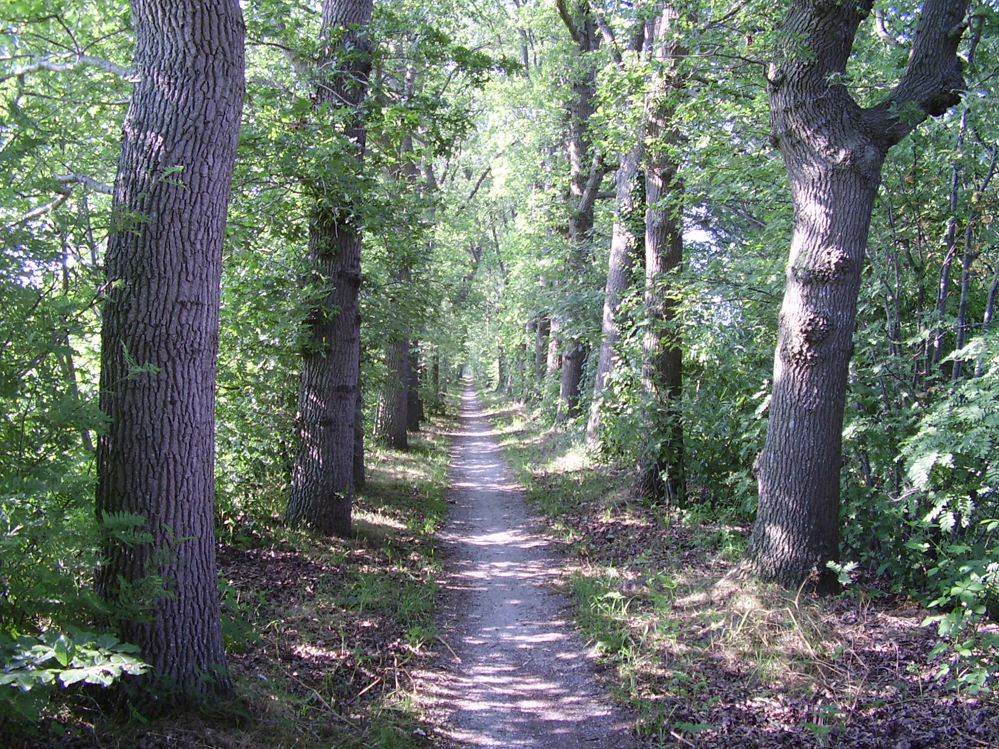 Fietspad door het landgoed van de Coenderborg